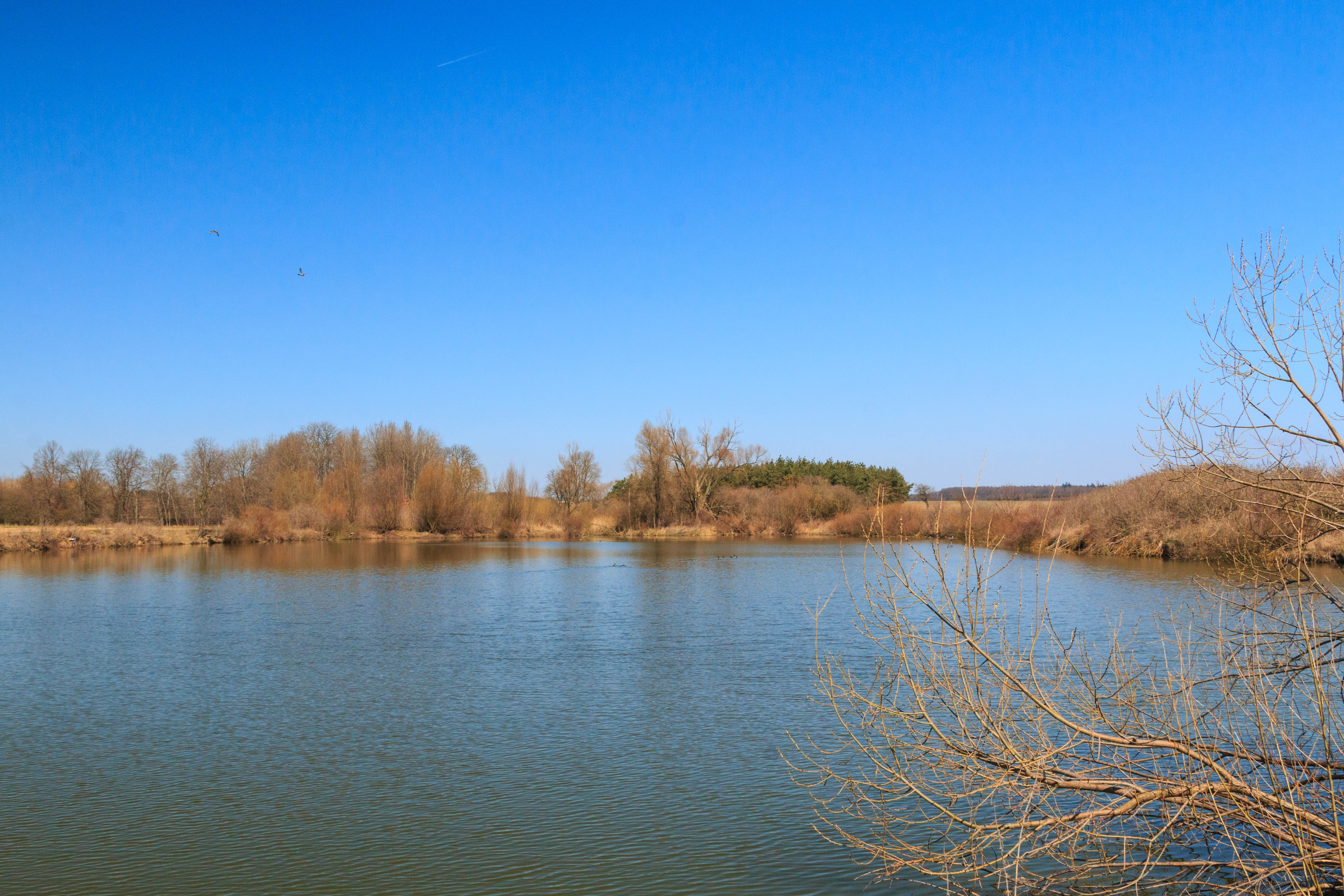 rybník Vysušil u obce Kosičky v okrese Hradec Králové Project: Vodstvo.